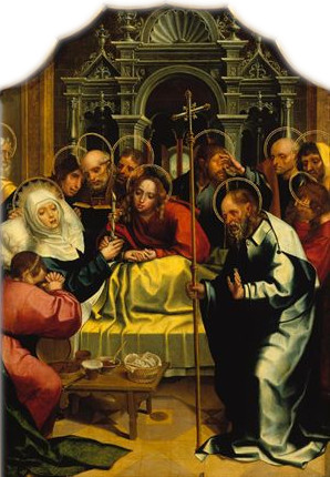 O retábulo "do Paraíso", assim designado uma vez que provém do altar-mor do extinto Convento do Paraíso em Lisboa, foi já objecto de alguns estudos que resultaram em opiniões diversas e divergentes no que toca à sua autoria. Num primeiro momento, o conjunto foi atribuído a Grão Vasco (Vasco Fernandes), por Taborda e Cirilo, opinião refutada por Raczynski que propôs o nome de Abram Prim (Primus). Carl Justi apontou como autor o pintor Velascus e Émile Bartaux dividiu a série em dois conjuntos, atribuindo a "Anunciação", a "Visitação" e a "Natividade" a Cristóvão de Figueiredo, e os restantes painéis ao "Mestre do Retábulo de Santiago". Foi, porém, José de Figueiredo quem reagropou novamente as oito pinturas e as enquadrou na obra do "Mestre do Paraíso", no que foi secundado por Reinaldo dos Santos. A Myron Malkiel-Jirmounsky, coube alertar para o facto de estarmos na presença de uma obra colectiva e não de um só pintor. Actualmente, e na esteira deste último historiador, ainda que se destaque o nome de Gregório Lopes na atribuição deste conjunto retabular, não há dúvida em se afirmar que se trata de uma obra de parceria, o que é desde logo visível na heterogeneidade pictórica e técnica das várias tábuas que o compõem.